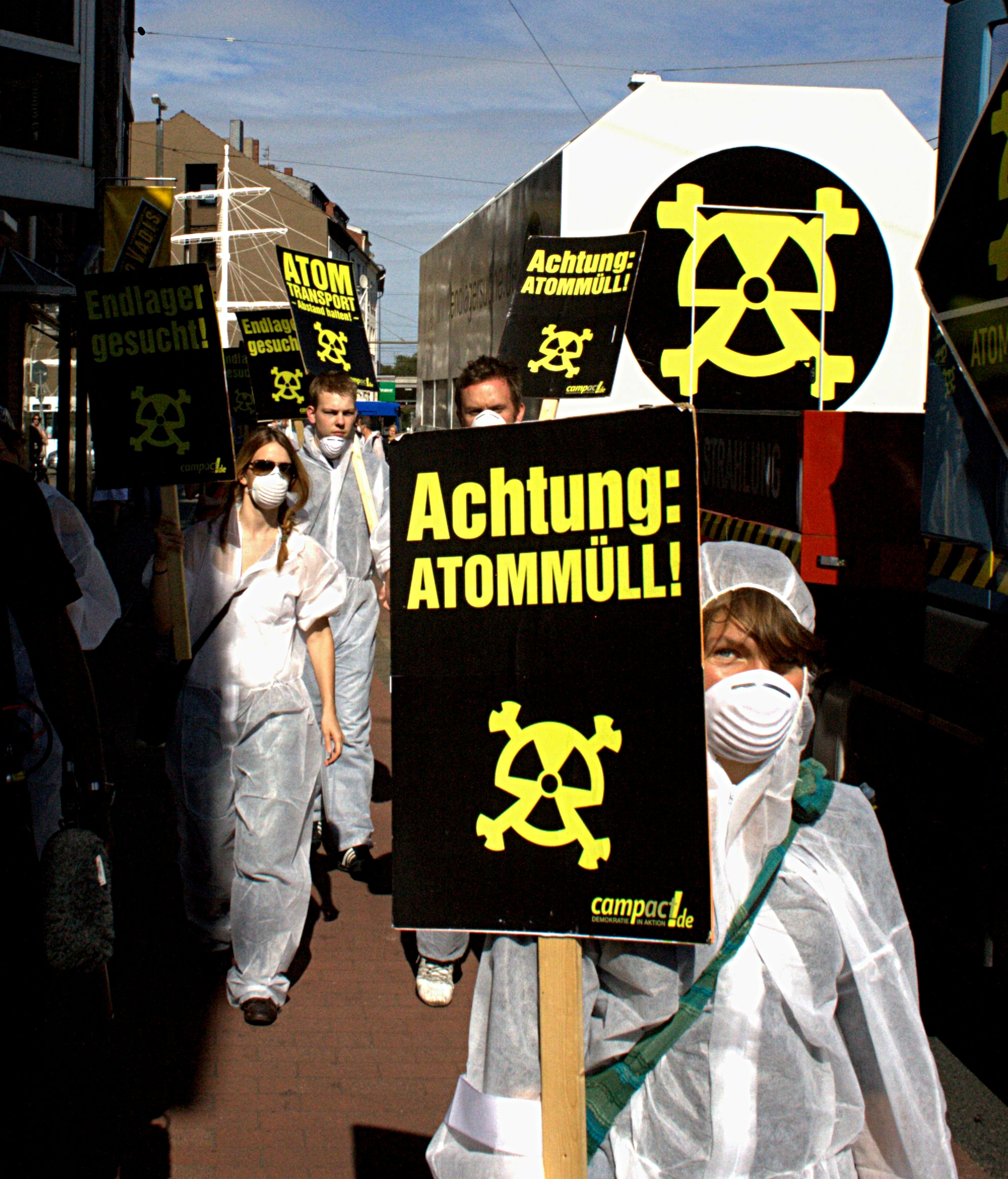 Campact AntiAtom Kampagne 2009 in Bremen